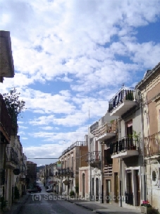 Rilasciata sotto licenza GFDL dopo aver ricevuto l'autorizzazione dell'autore Autore: Sebastiano Puccio, Fonte: , Licenza: GFDL